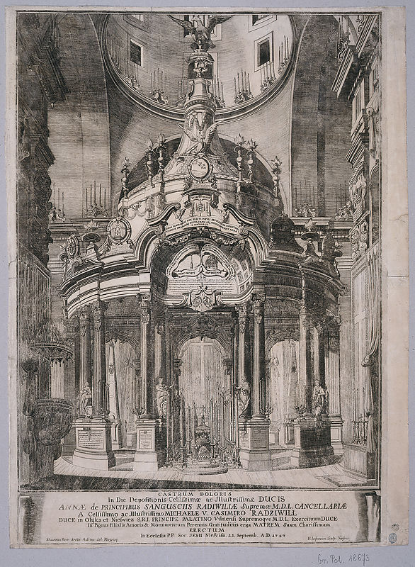 Castrum doloris Anny Katarzyny z Sanguszków Radziwiłłowej wystawione w kościele Jezuitów w Nieświeżu w dniu 11 września 1747 roku